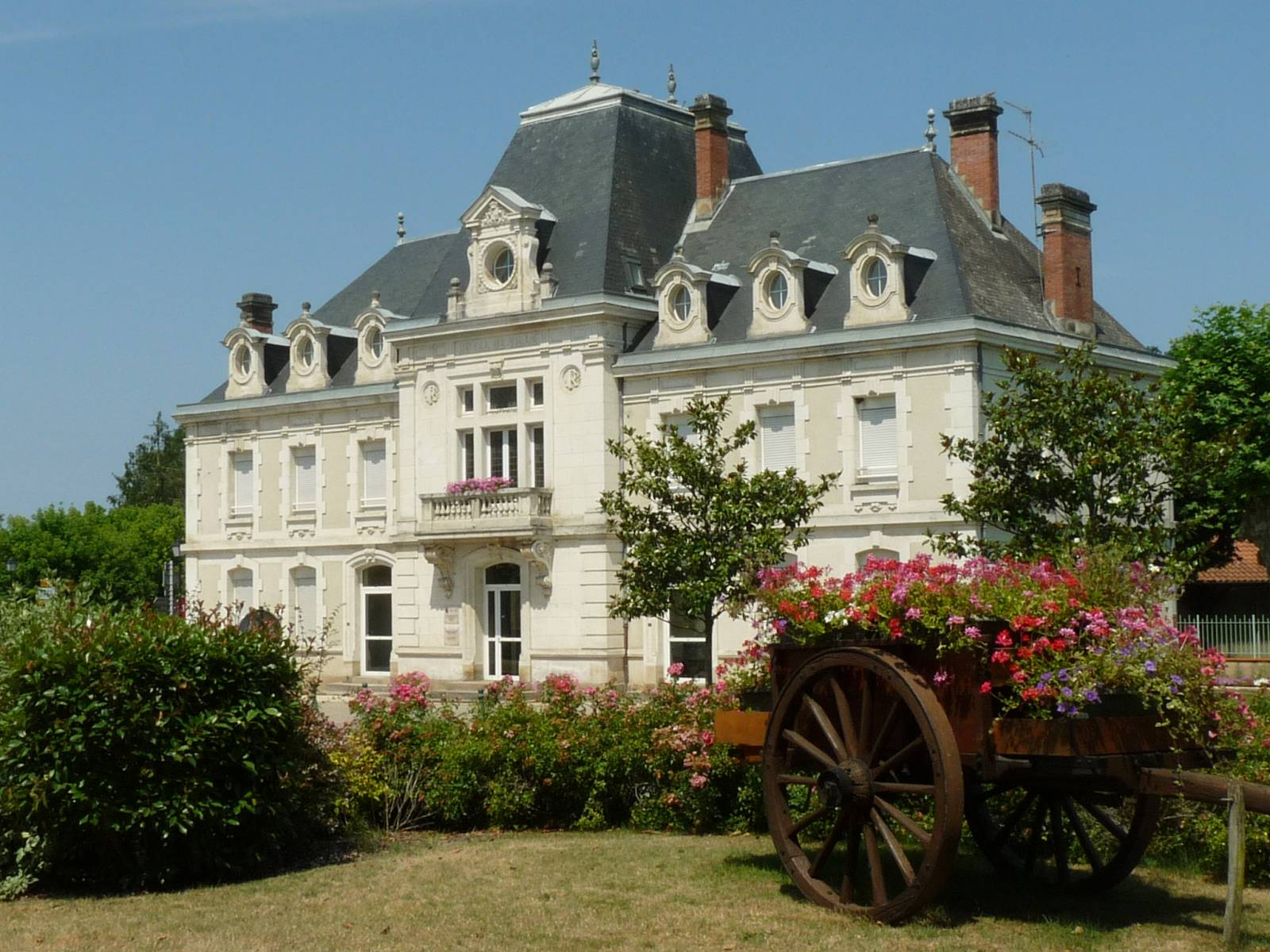 mairie de Labrit, Landes, France